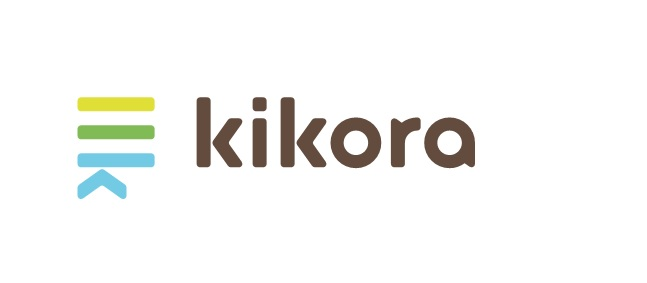 Kikora logoen med gult grønt og blått